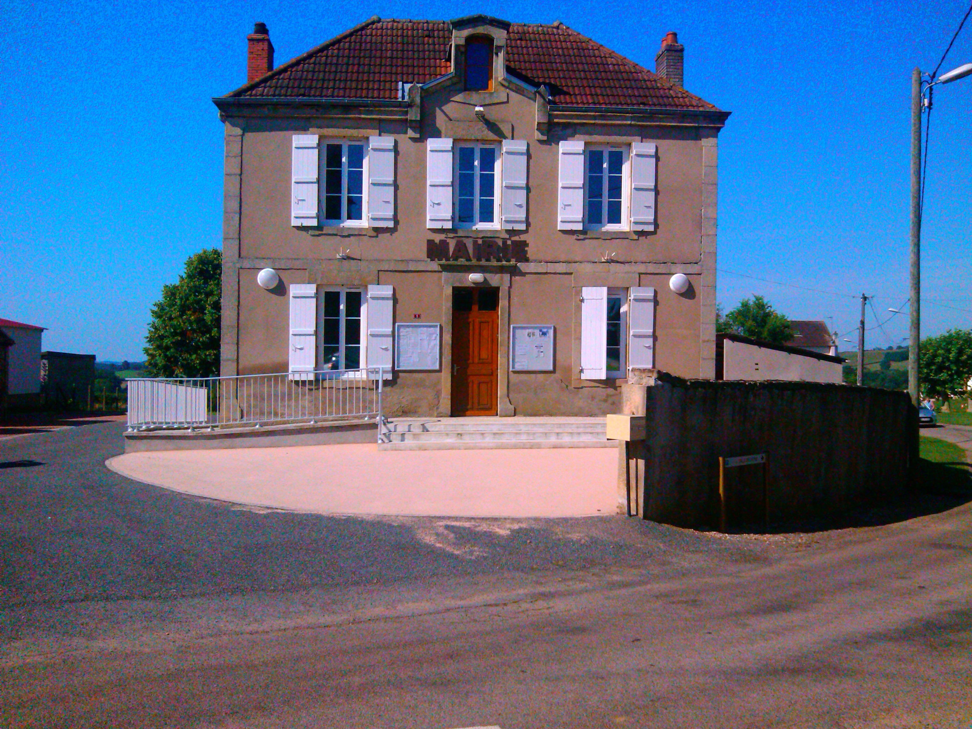 La Mairie